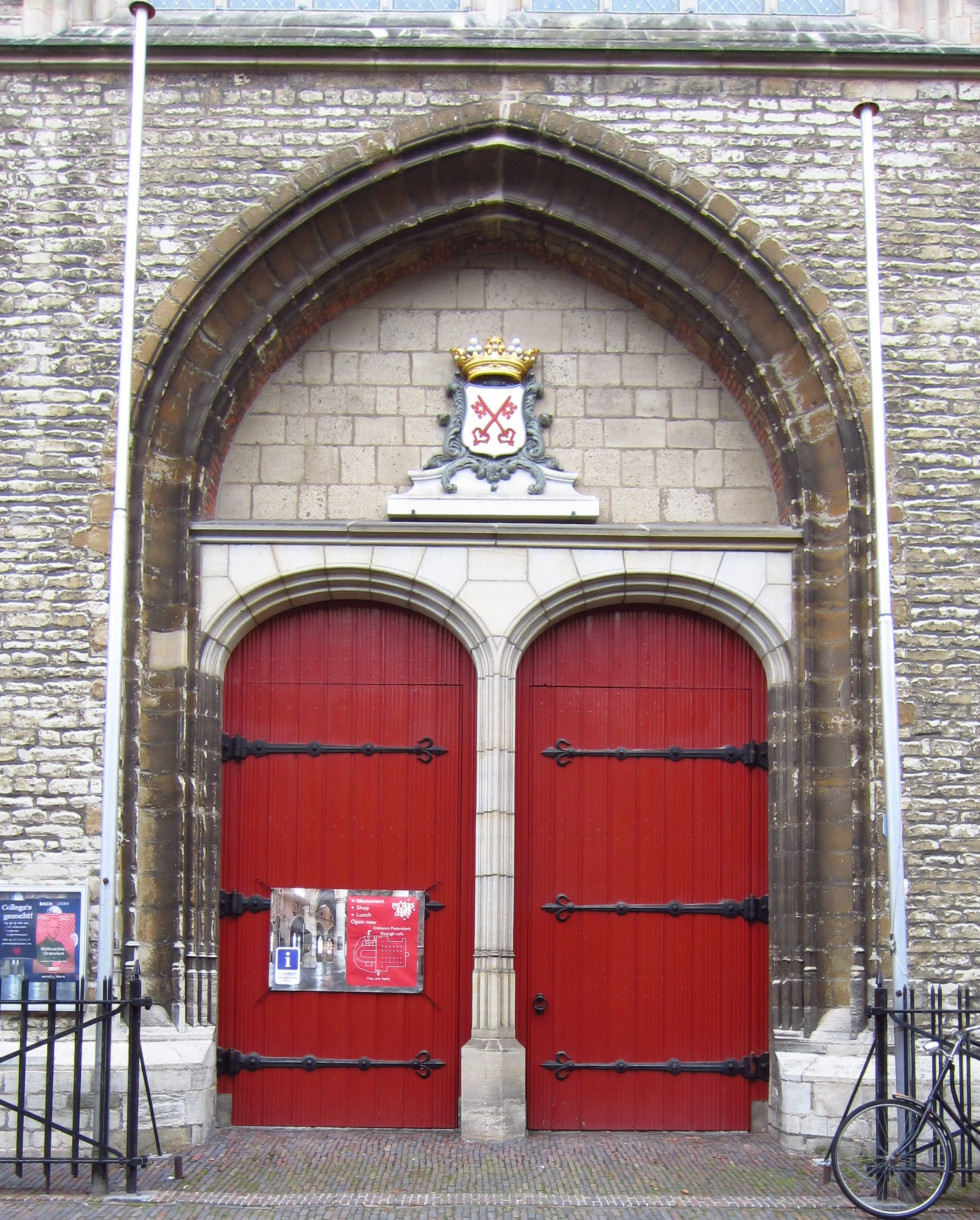 Pieterskerk Leiden toegangsdeuren noord